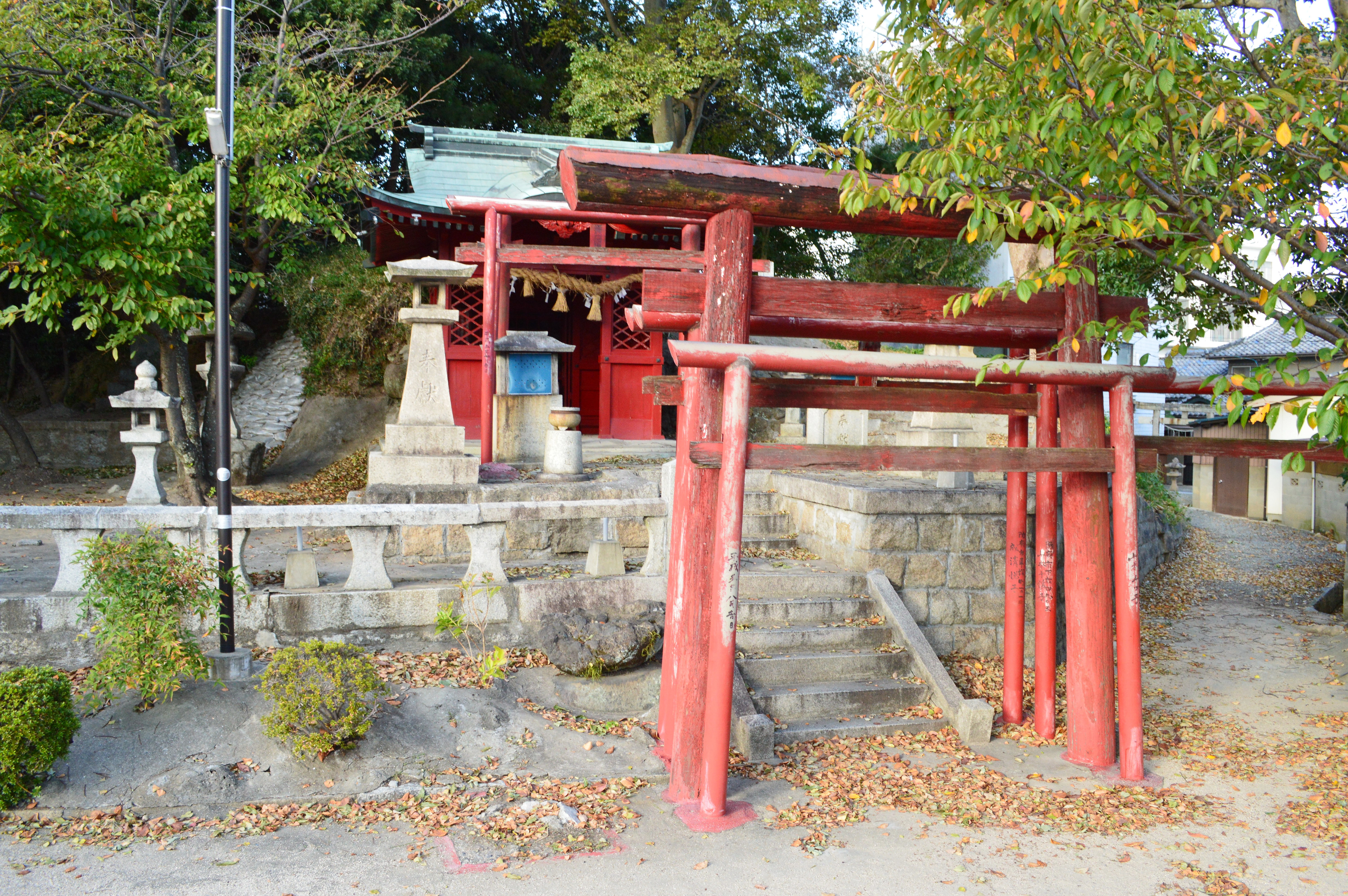 車塚古墳 (防府市) 前方部石室前面の稲荷社